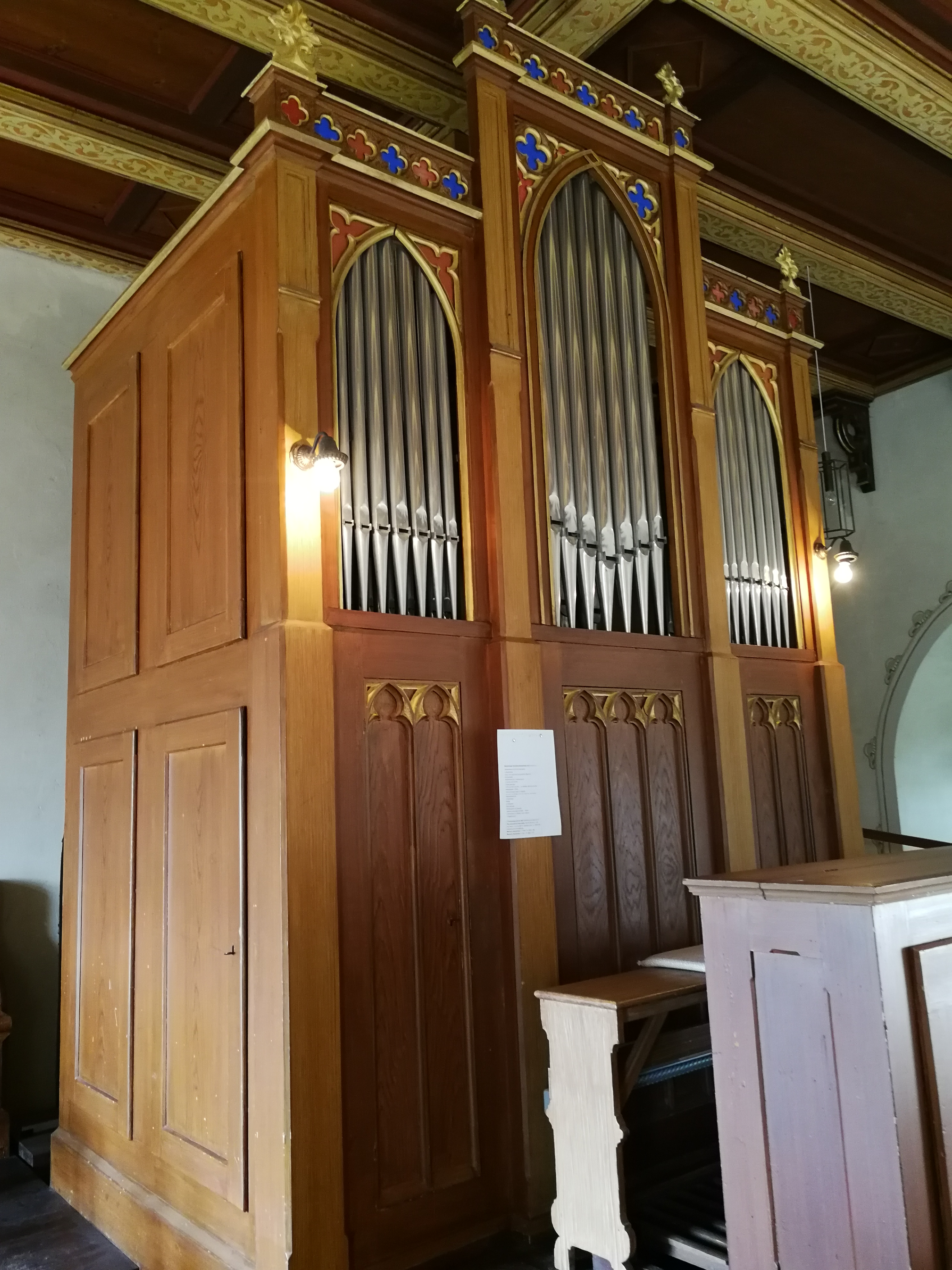 Baujahr 1870, Opus 92, Kegellade, 7 Register, Calcant, Kirche St. Michael Sausenhofen Pfeifenmaterial aus der Vorgängerorgel vorhanden. Neue 4´ Prospektpfeifen von 1989